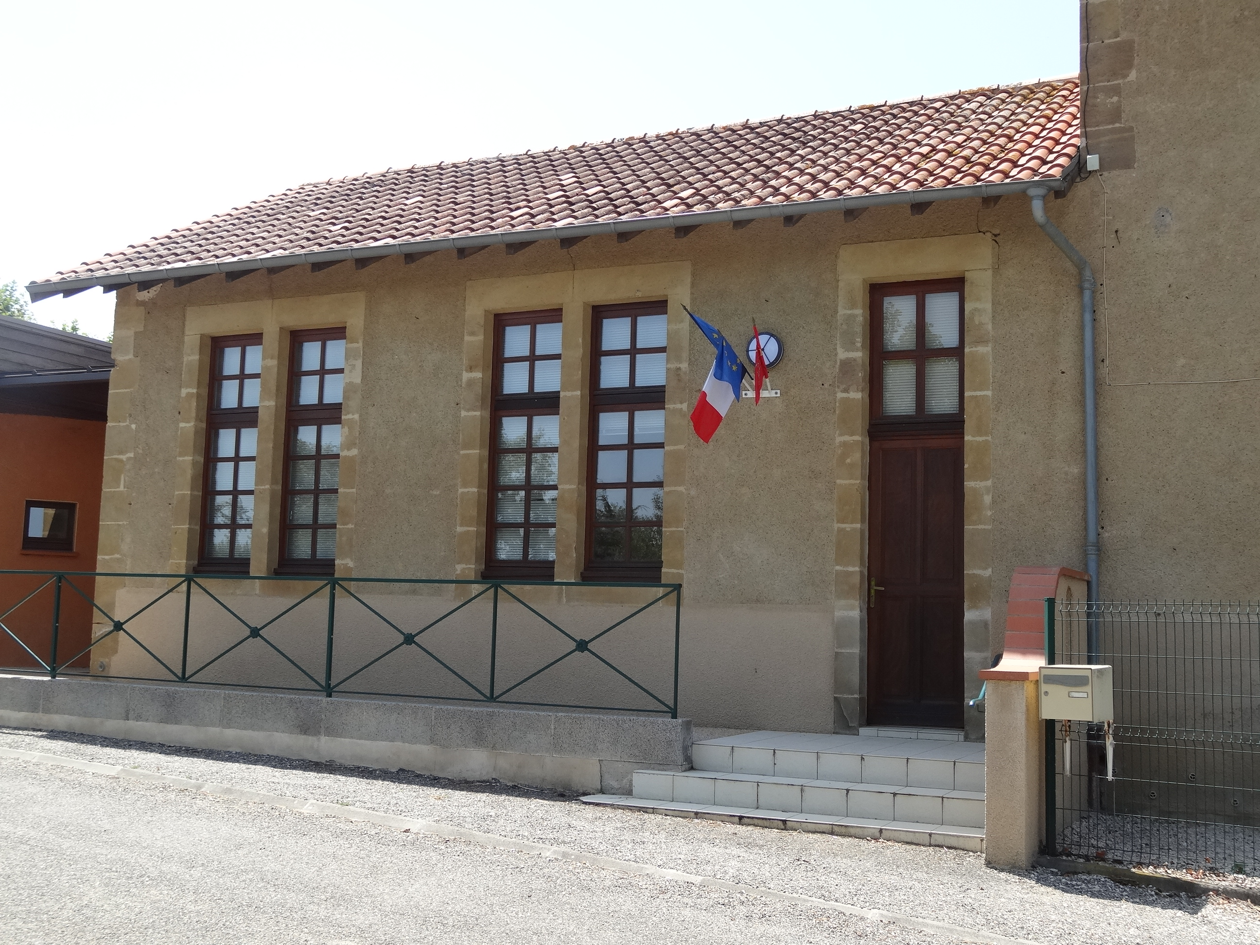 La mairie d'Aussos